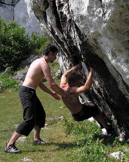 Spoting na łatwym boulderze. Oświadczam, że jestem autorem zdjęcia i nadaję mu status PD - Andrzej Makarczuk